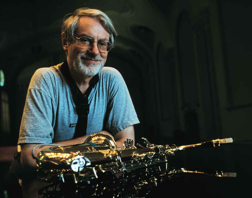 Porträt Bruno Spörri